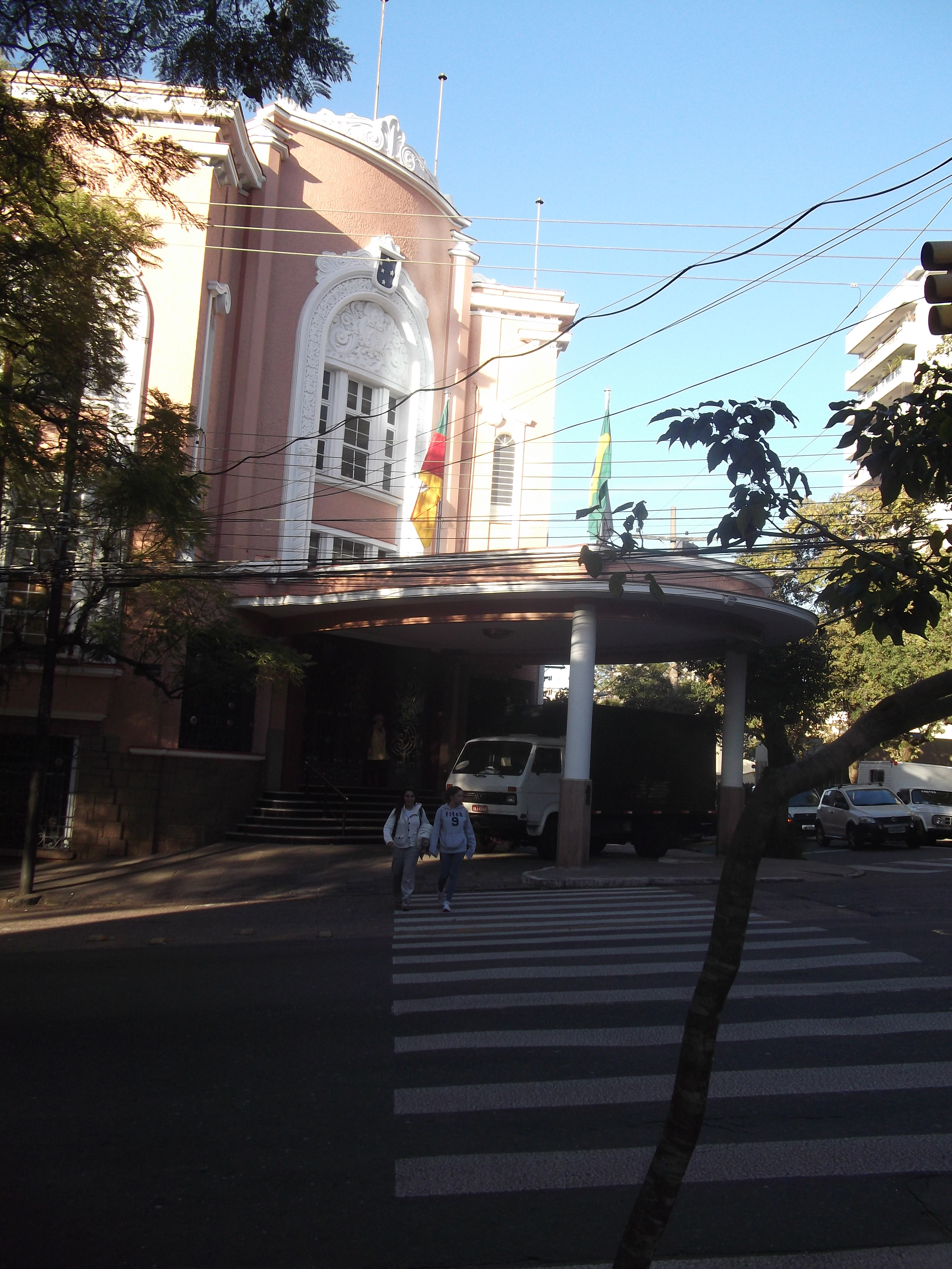 Associação Leopoldina Juvenil, Porto Alegre, Brasil